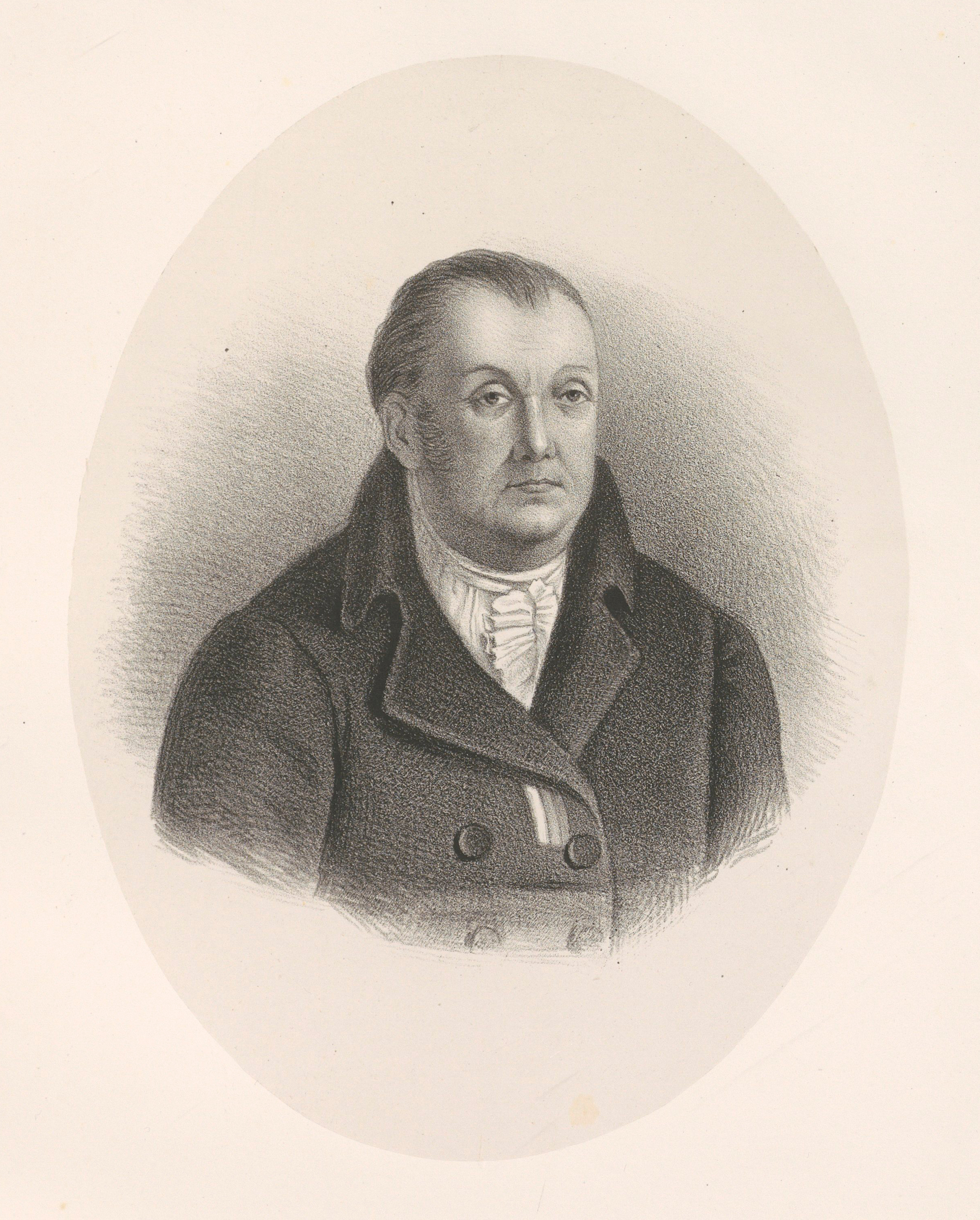 Беларуская (тарашкевіца): Вінцэнт Тышкевіч